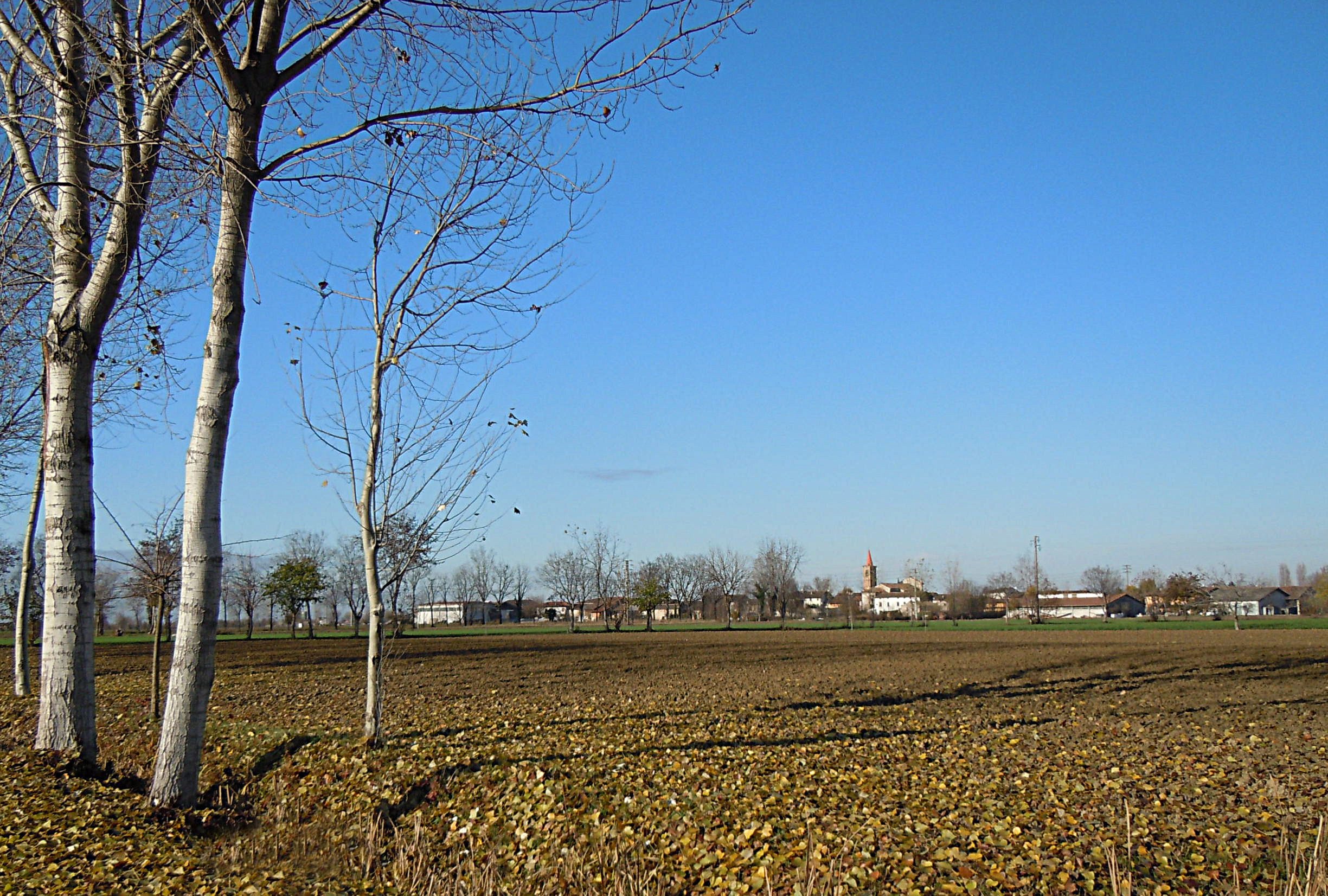 Casalpoglio, campagna.